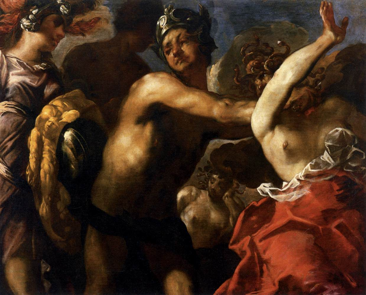 Perseo corta la cabeza de Medusa